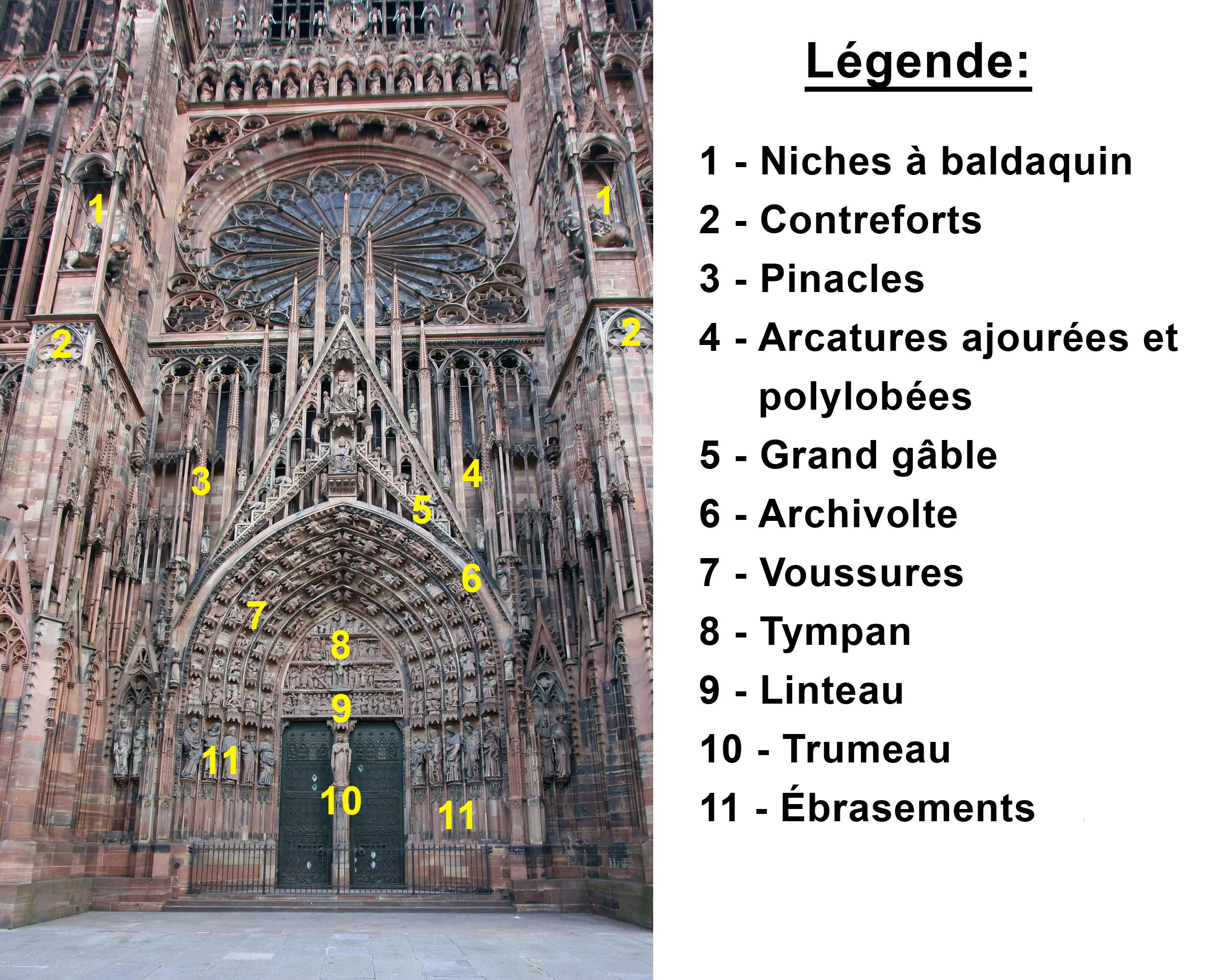 description d'un portail gothique